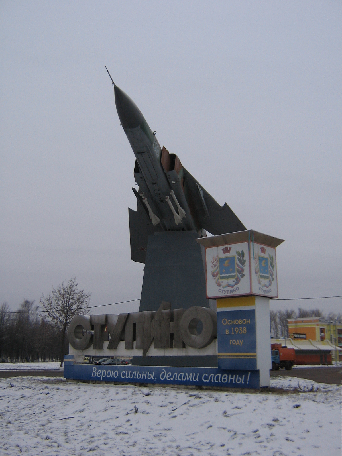 Памятник ступинцам-создателям авиационной техники на въезде в Ступино